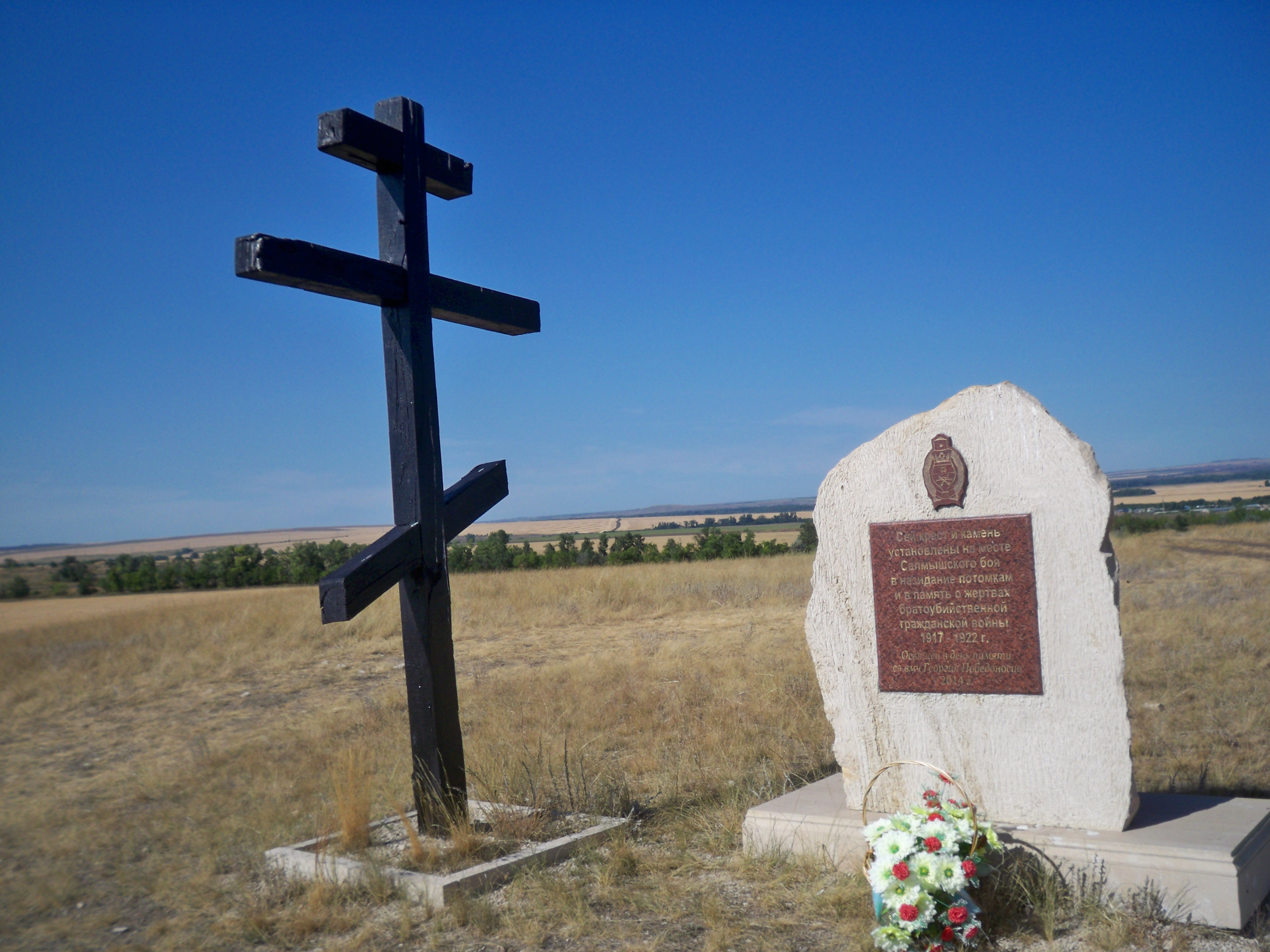 Памятное место, где оренбургским и орским полками в бою на реке Салмыш были разгромлены войска Колчака: гора Янгиз, Архиповка, Сакмарский район, Оренбургская область